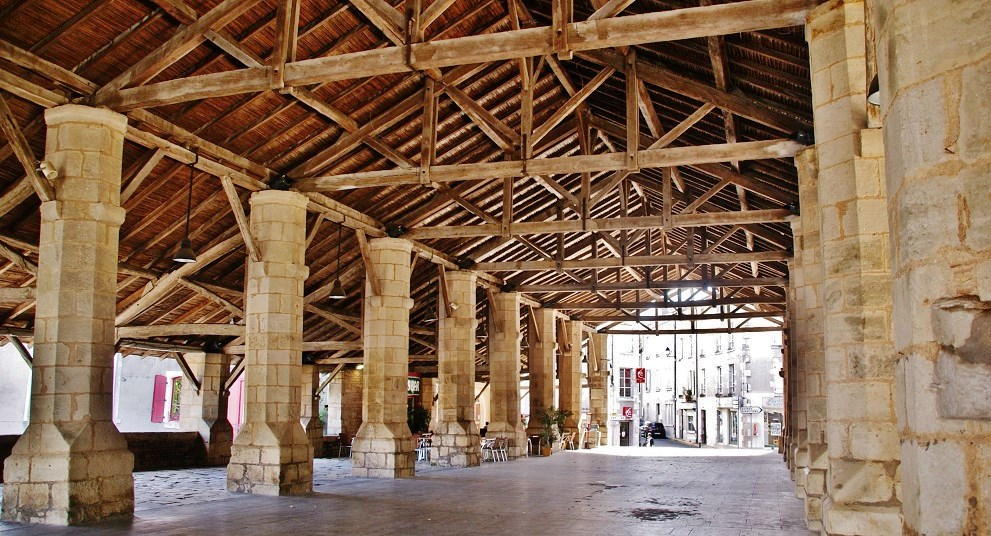 La Halle